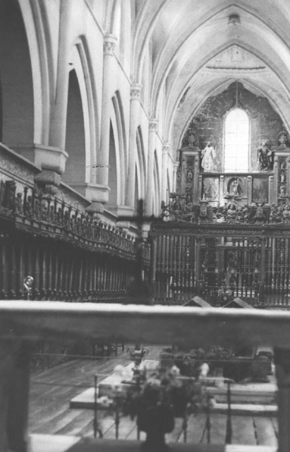 Monasterio de las Huelgas. Reja. Coro - Burgos - Fotografía B/N